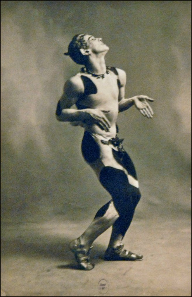 Walery Photographie Vaslav Nijinsky dans l'Après-midi d'un faune Ballet de Vaslav Nijinsky Création des ballets russes de Serge Diaghilev au Théâtre du Chatelet en 1912 Exposition Ballets russes Bibliothèque-musée de l'Opéra de Paris